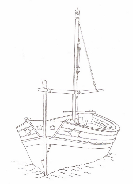 riproduzione di maria fenicia della filuga ponzese a vela latina del 1950 restaurata da giovanni hausmann